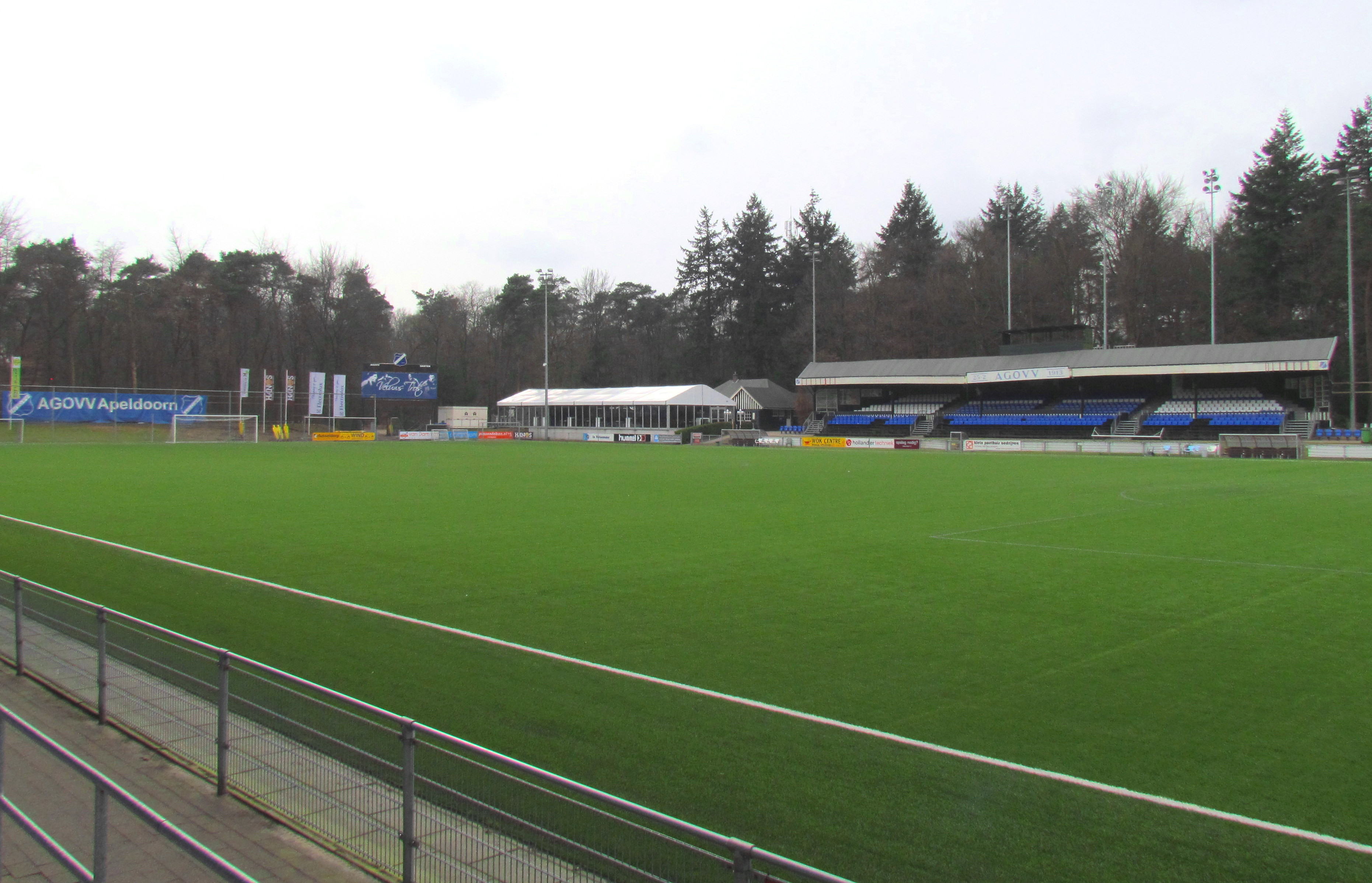 Stadion van voetbalclub AGOVV Apeldoorn